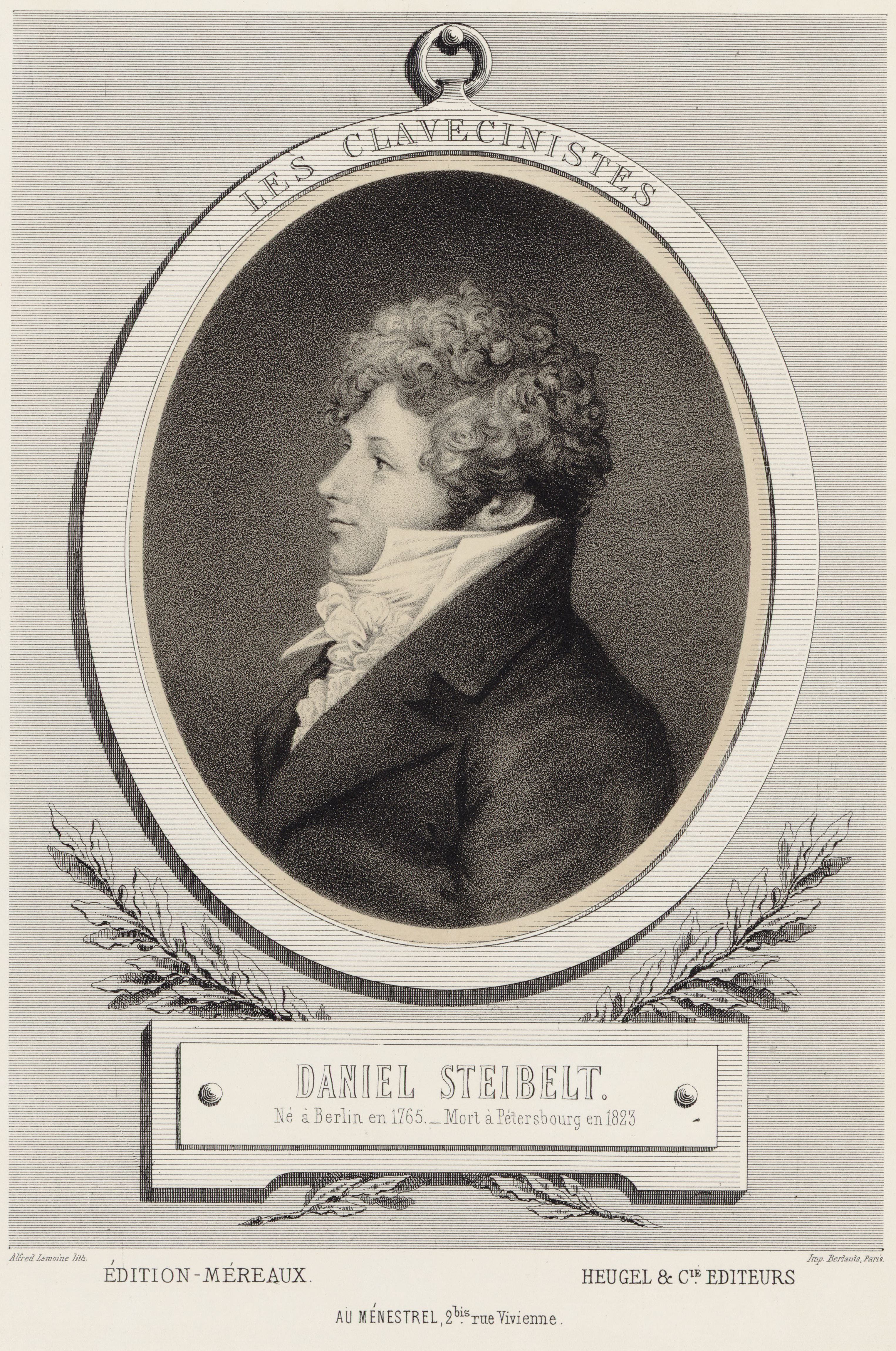 Daniel Steibelt, German pianist, composer